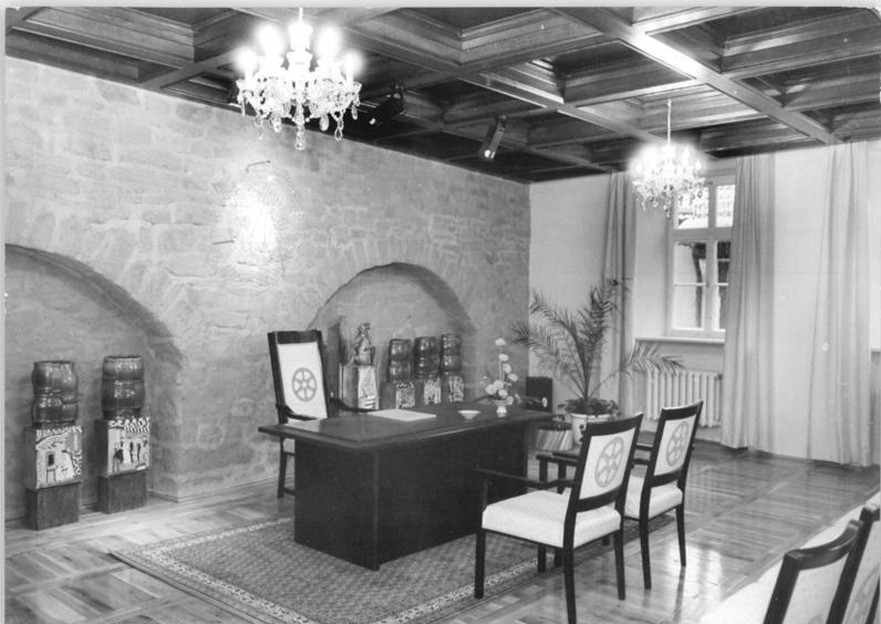 ADN-ZB-Hirndorf-24.5.1989-Neues Standesamt in Erfurt. Ein neues Standesamt in Erfurt wurde im Dezember 1988 der Öffentlichkeit übergeben. Das "Das Haus zum Sonneborn" wurde im Jahre 1558 im Renaissancestil errichtet. Bis zu seiner heutigen Funktion diente es als Bierbrauerei, Gaststätte und Fleischerei. Aus geschichtlicher und denkmalpflegerischer Sicht wurde in enger Zusammenarbeit zwischen Architekten, Künstlern und Handwerkern ein wahres Kleinod geschaffen. Das beginnt schon bei dem mit viel Geschick restaurierten Portal und setzt sich fort bis zu den drei Eheschließungsräumen (Foto), die mit ihrem historischen Gewand die Zeremonie der Eheschließung feierlich umrahmen.